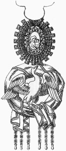 Zwanenorde